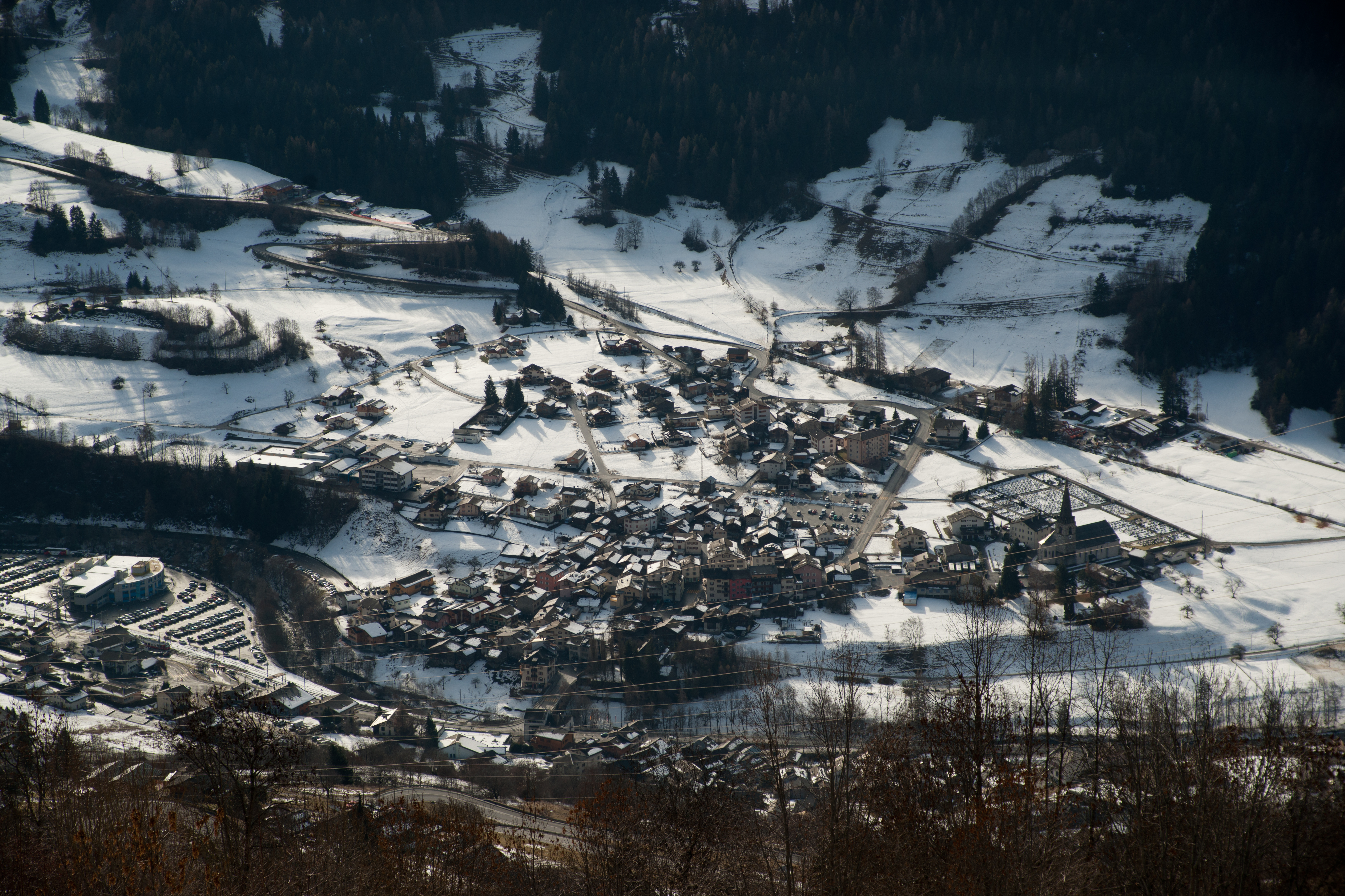 Le Châble, commune de Bagnes, canton du Valais, Suisse.